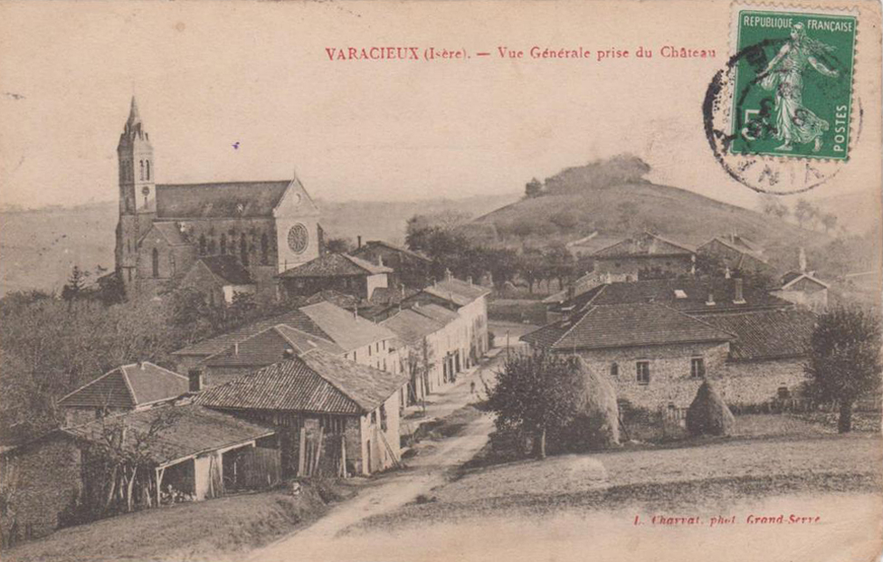 Varacieux, vue générale prise du chateau. Carte postale ancienne.